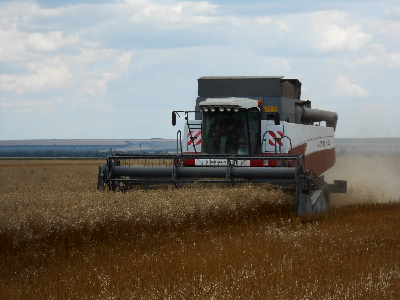 Комбайн РостСельМаш в Слободзейском районе Приднестровья Taken with Nikon Coolpix S2700